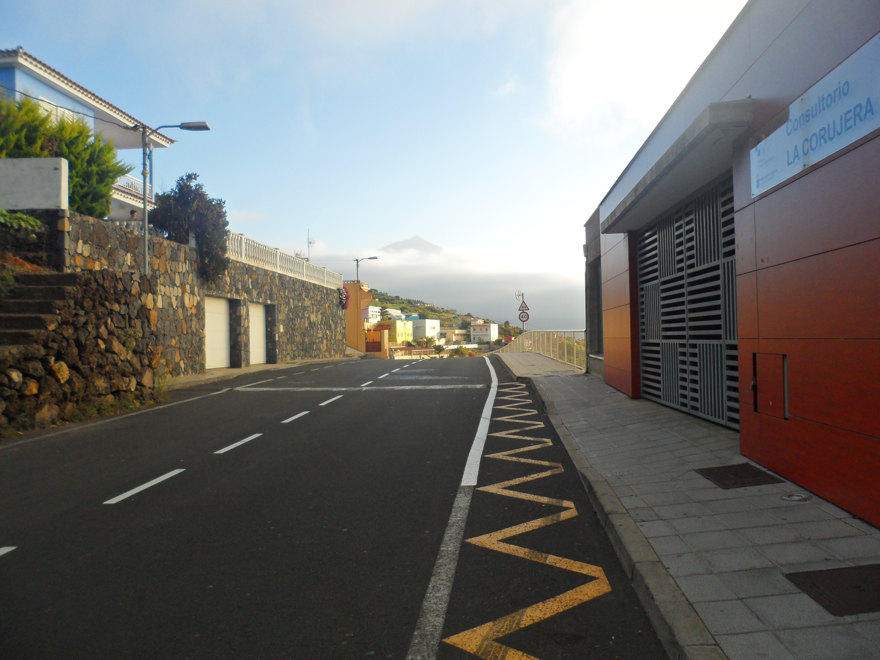 Calle La Corujera delante del Consultorio. Santa Úrsula